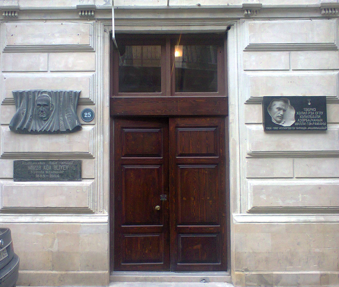 Улица и дом в котором жил Мирза Алиев и Тебриз Халилбейли